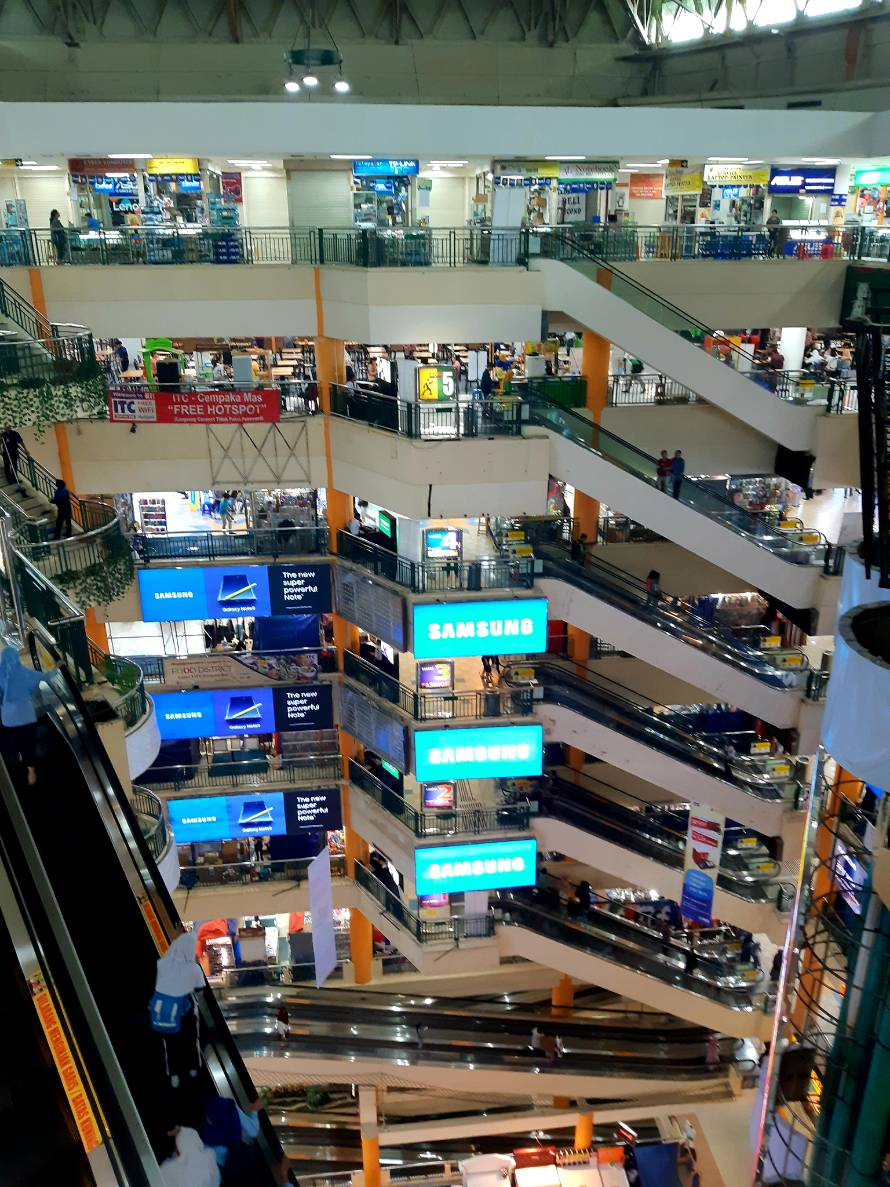 Tampak dalam dari ITC Cempaka Mas